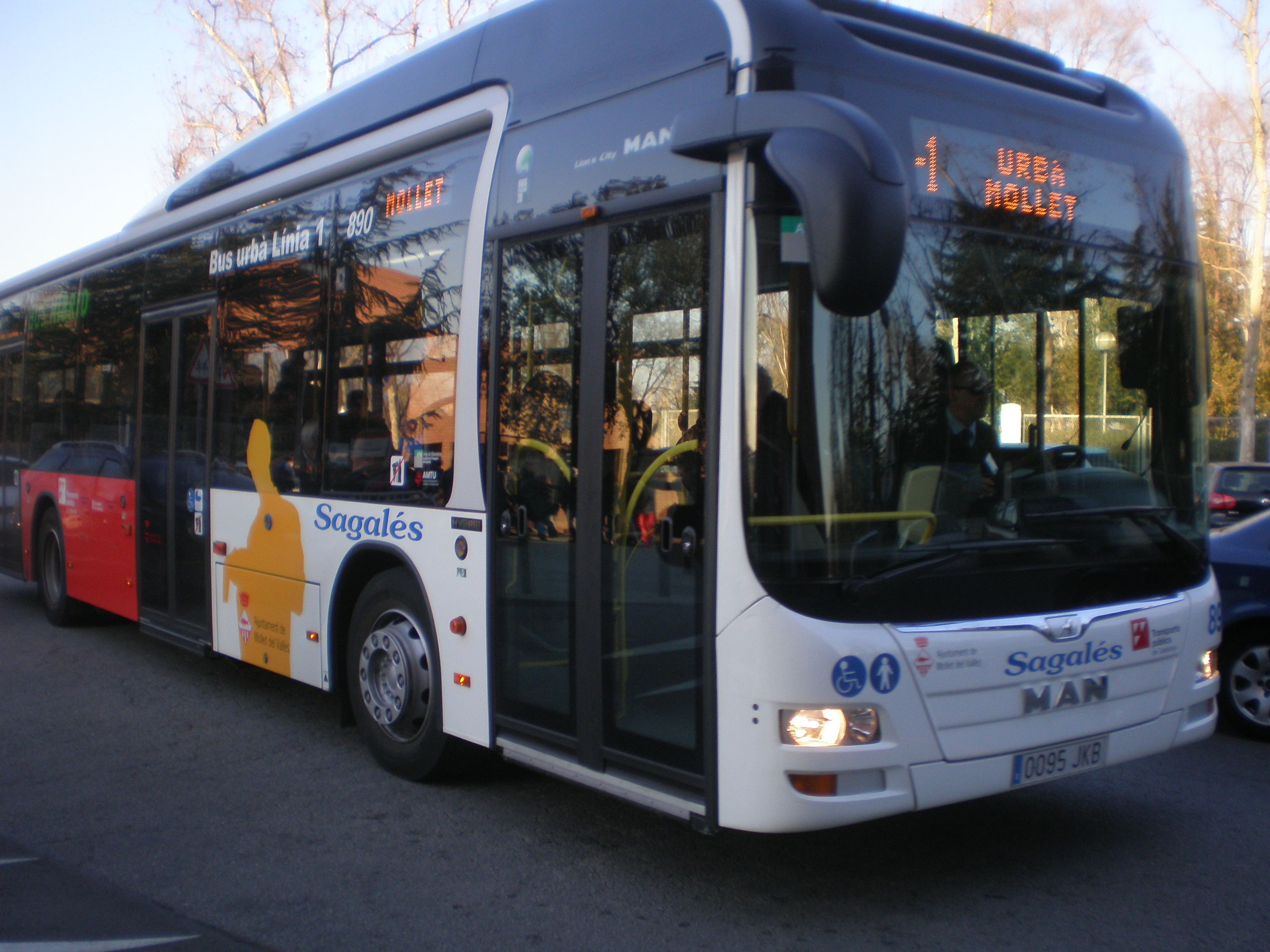 Mollet del Vallès.